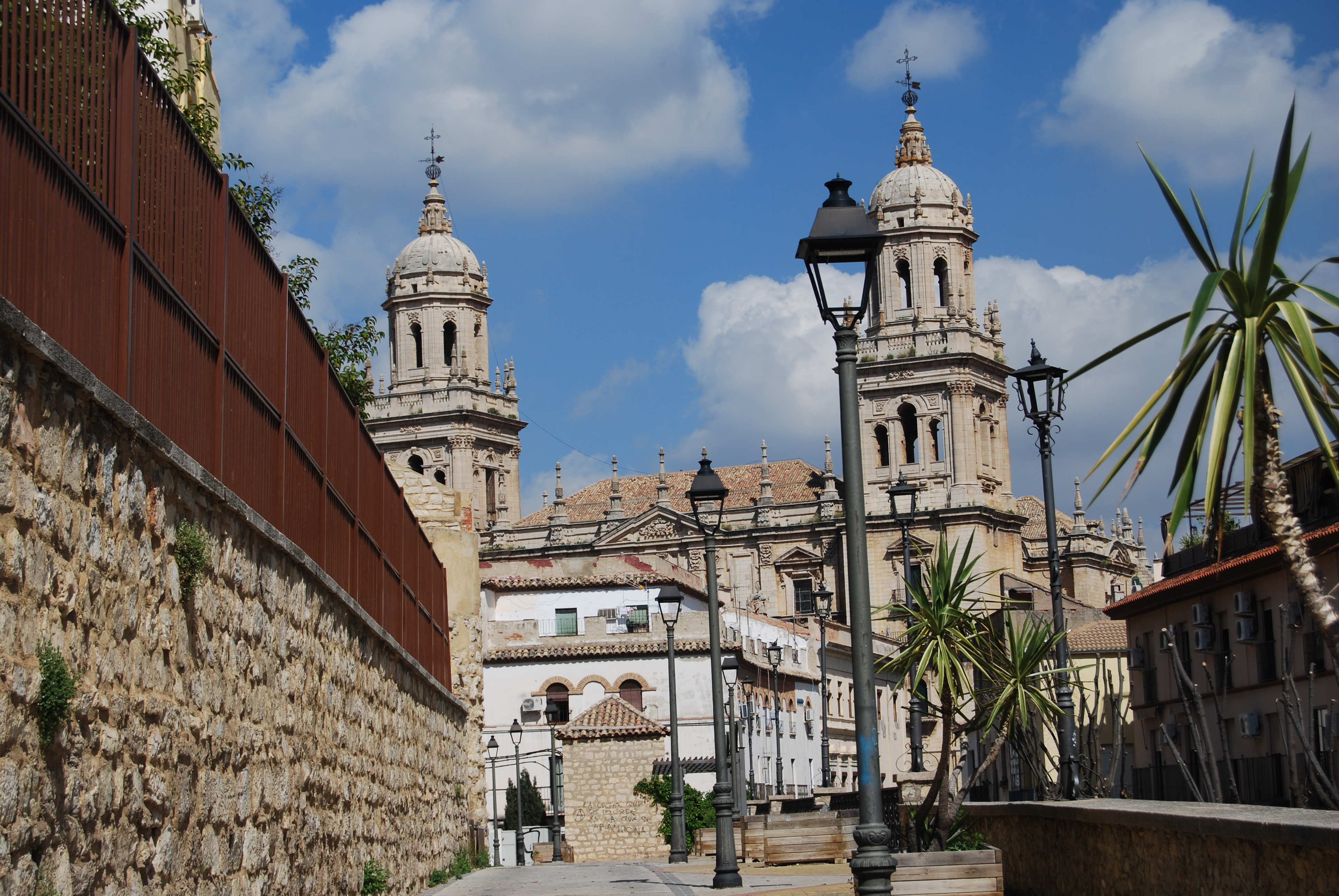 Imagen de Jaén con su catedral al fondo